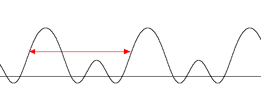 Grafiek van een periodieke functie geplot met een zelfgemaakt computerprogramma